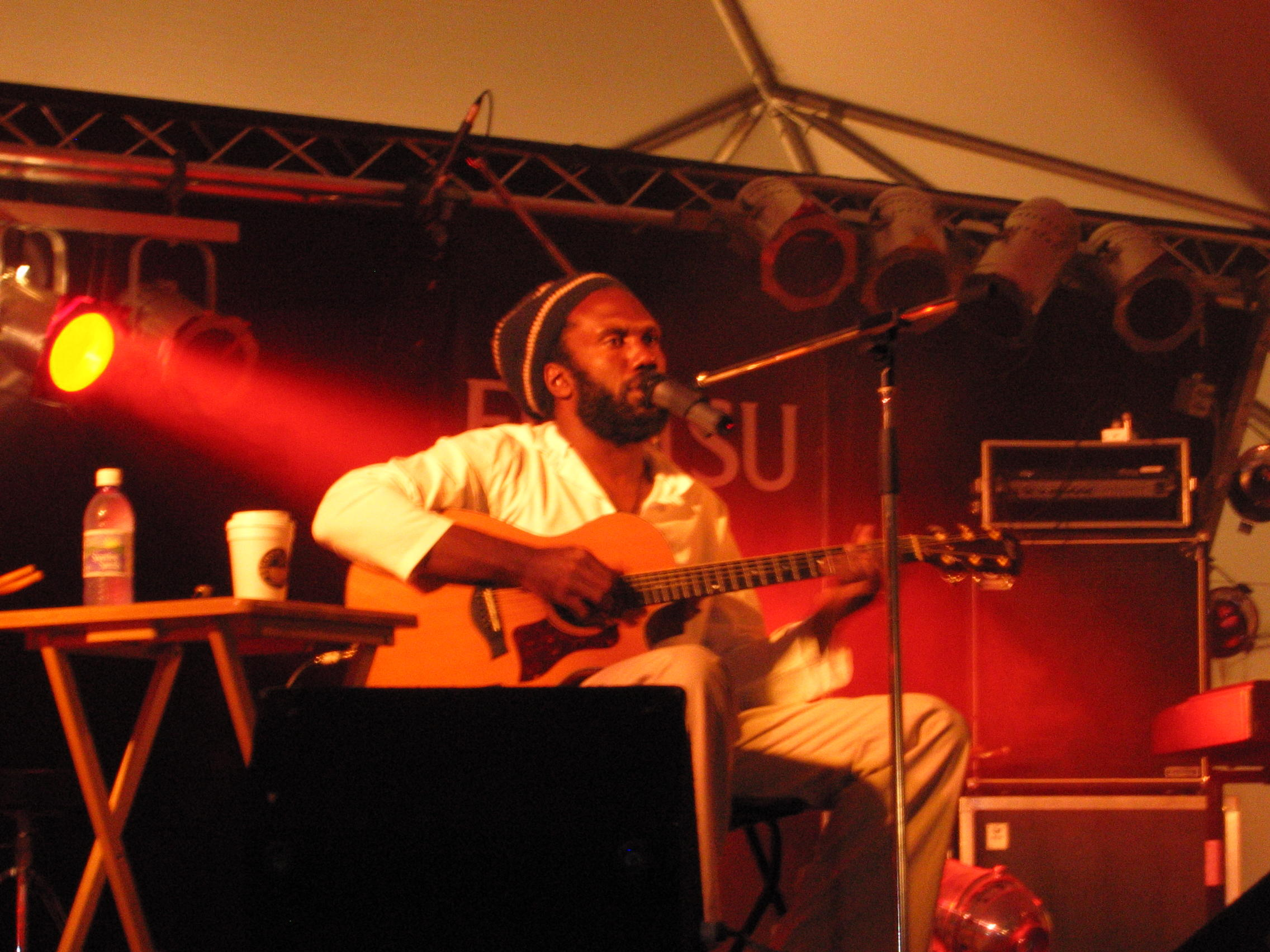 Corey Harris le 13/09/2003 au Harvest Jazz & Blues Festival (Fredericton, Canada)